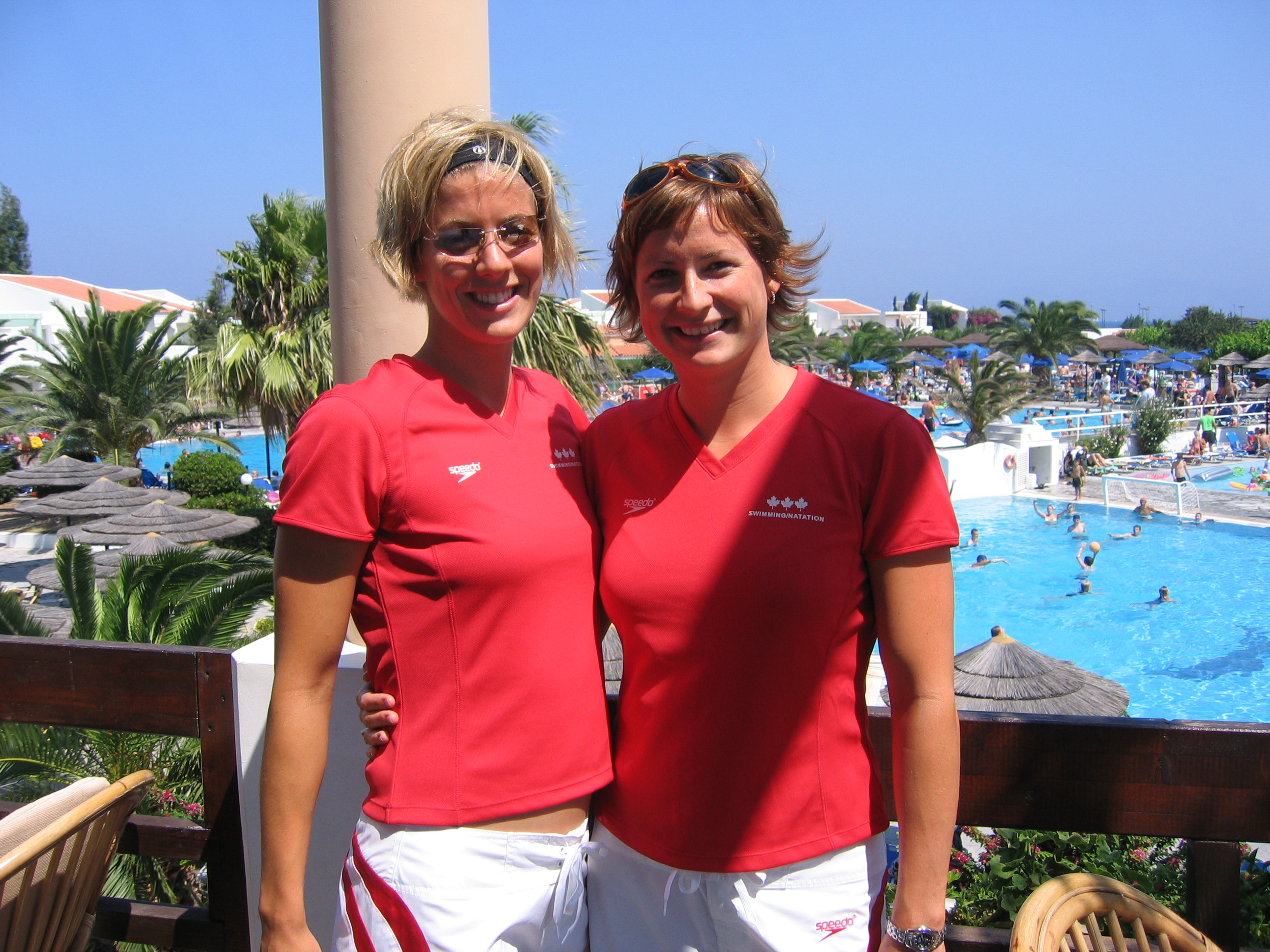 Lauren van Oosten at staging before Olympics in Kos. Own work.